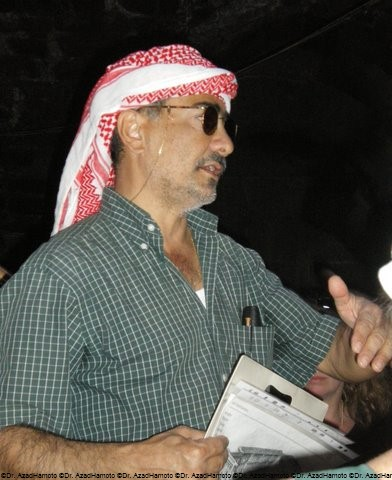 Azad Hamoto durante una visita archeologica culturale